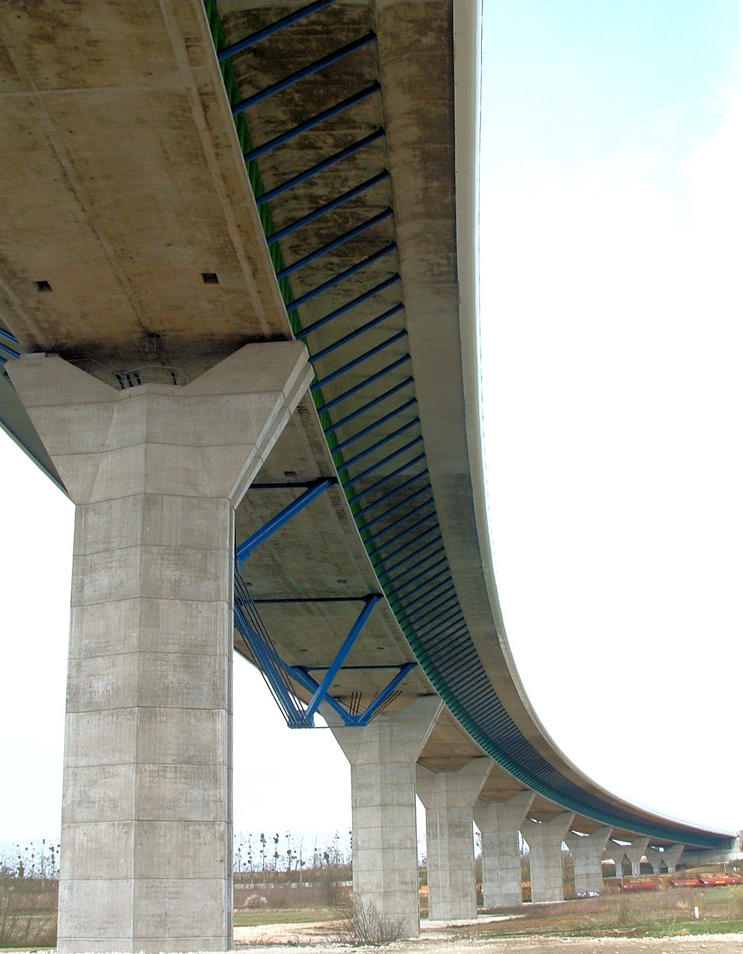 Viaduc de Meaux - Vu vers la culée côté ouest avec la travée sous-bandée pour le passage du canal